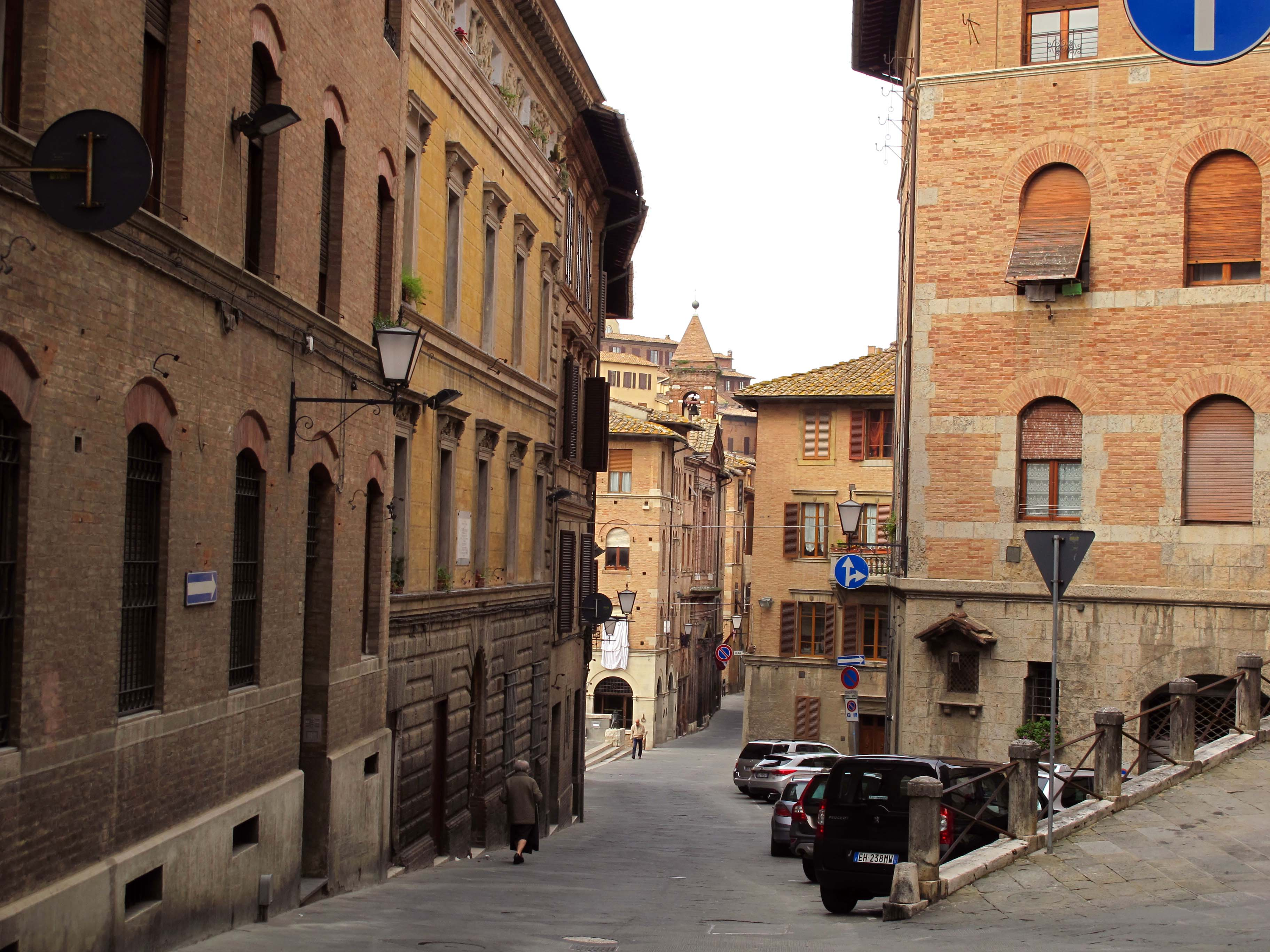 Via di Salicotto e dintorni, Siena